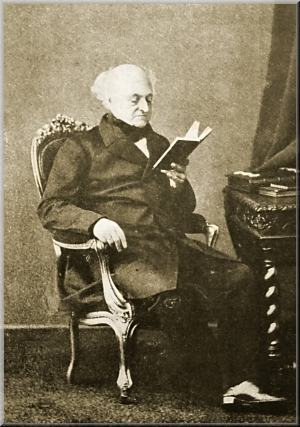 French musician Désiré Beaulieu (1791-1863)